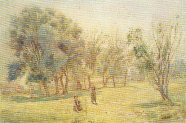 Чирко, Филипп Антонович (1859-1928). ПЕЙЗАЖ, холст, масло. Черниговский художественный музей